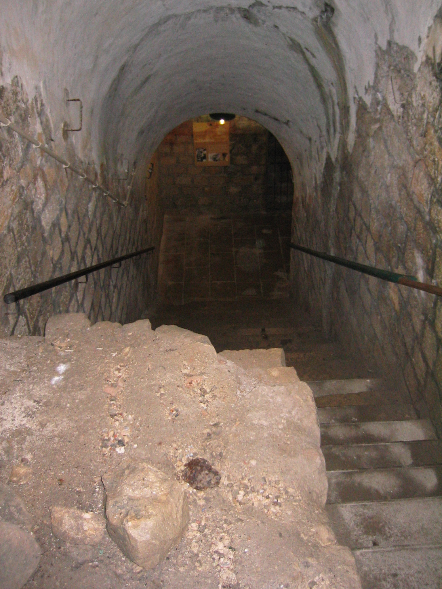 Fort de Vaux - Escalier descendant au puit du passage souterrain